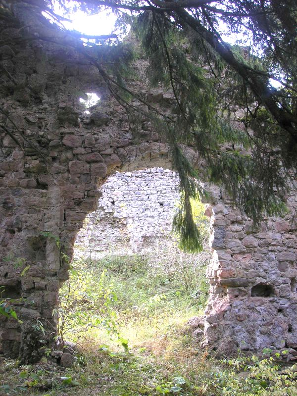 Burg Nesselburg (Nesselwang, Landkreis Ostallgäu, Bayerisch-Schwaben). Palas und Schildmauer, Blick nach Süden. Eigene Aufnahme, Okt. 2006 / Nesselburg castle above Nesselwang near Kempten (Bavaria, Germany). Main building and shield wall, looking south. Own photo, Oct. 2006